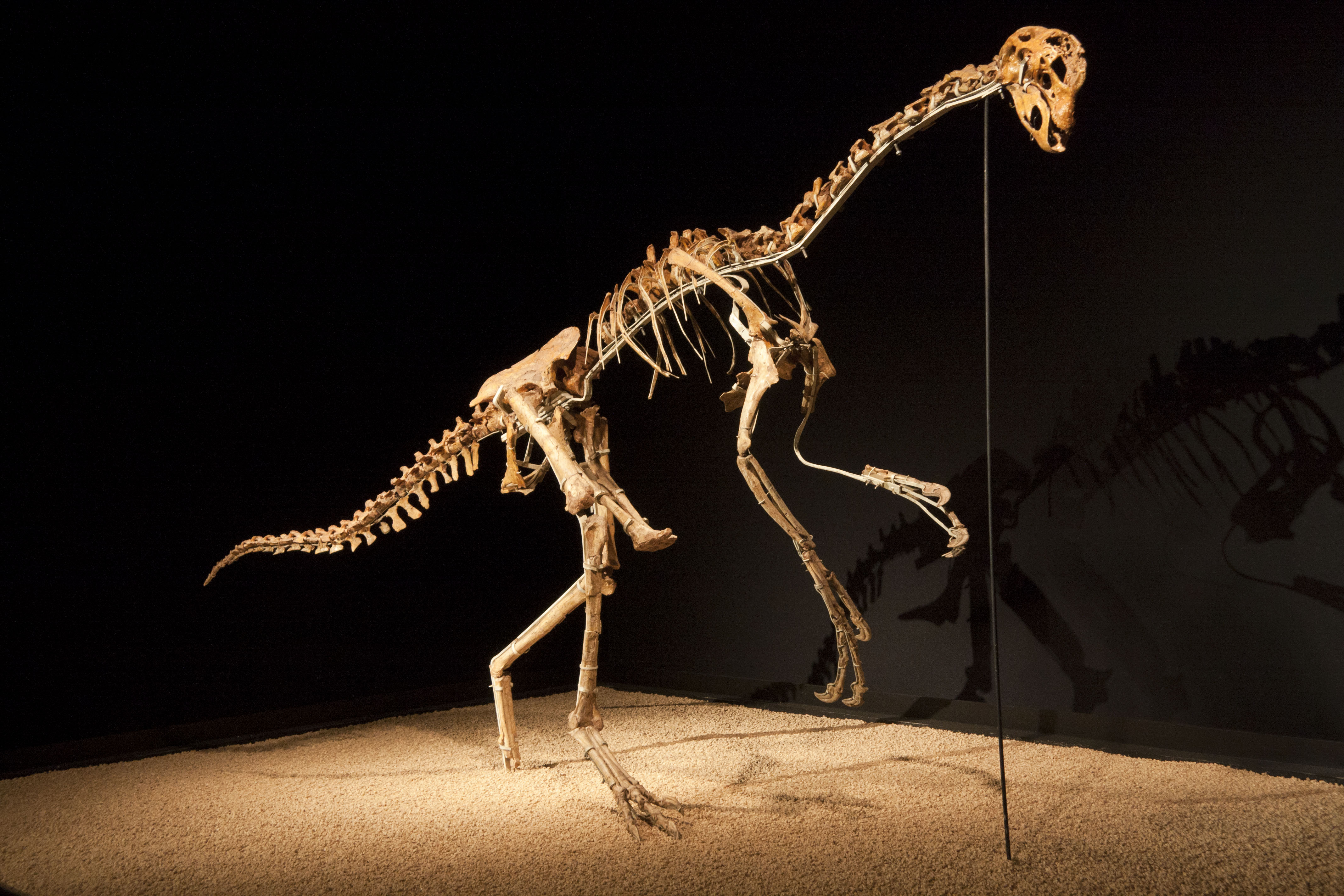 IMG_1215'